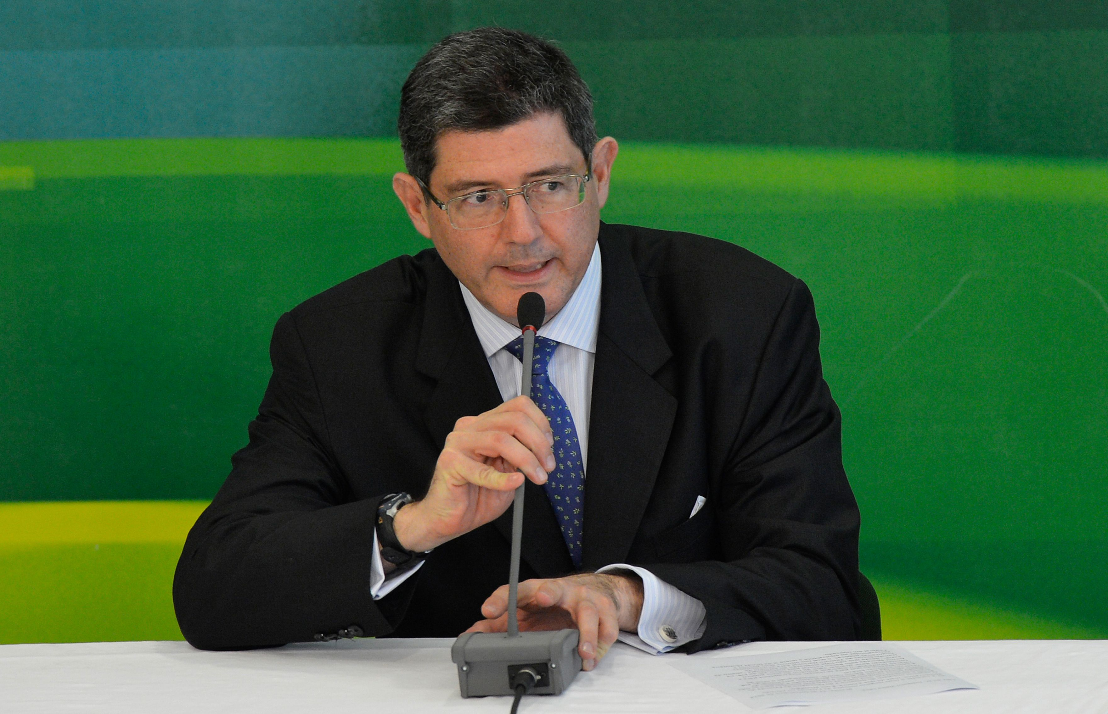 �Apresentação da nova equipe econômica. Na Foto: o novo ministro da Fazenda, Joaquim Levy.